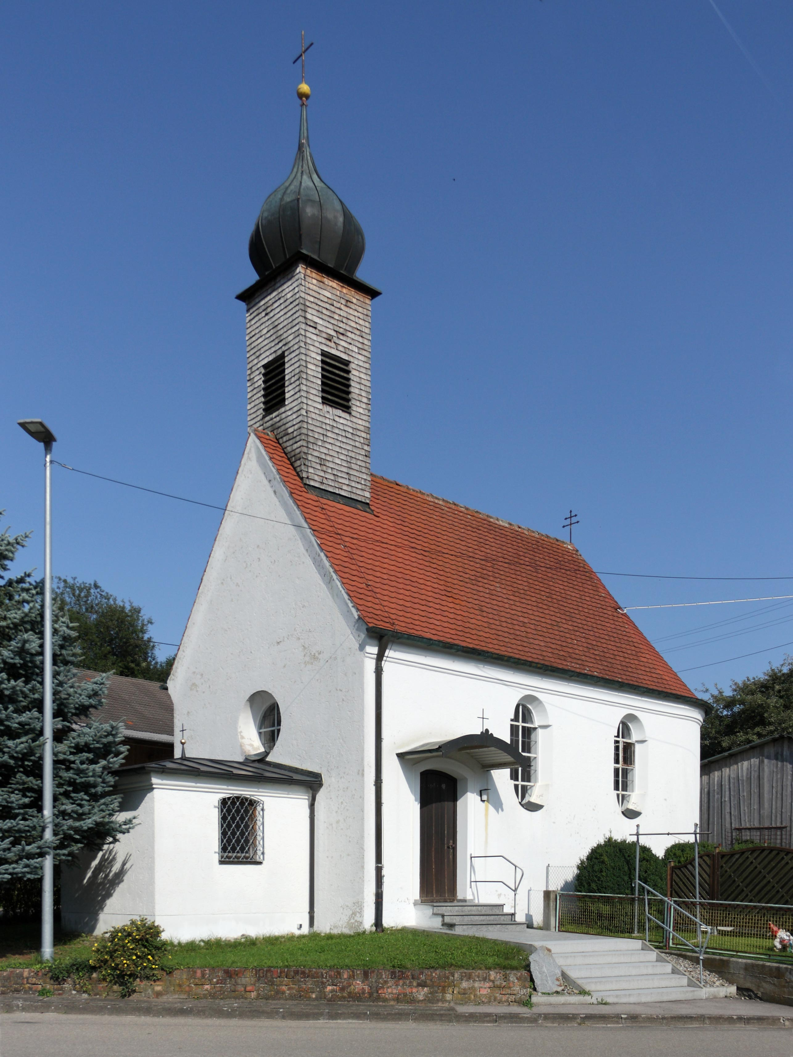 Kapelle St. Wendelin in Goldbach, Gemeinde Kammeltal; Ansicht von Südwesten